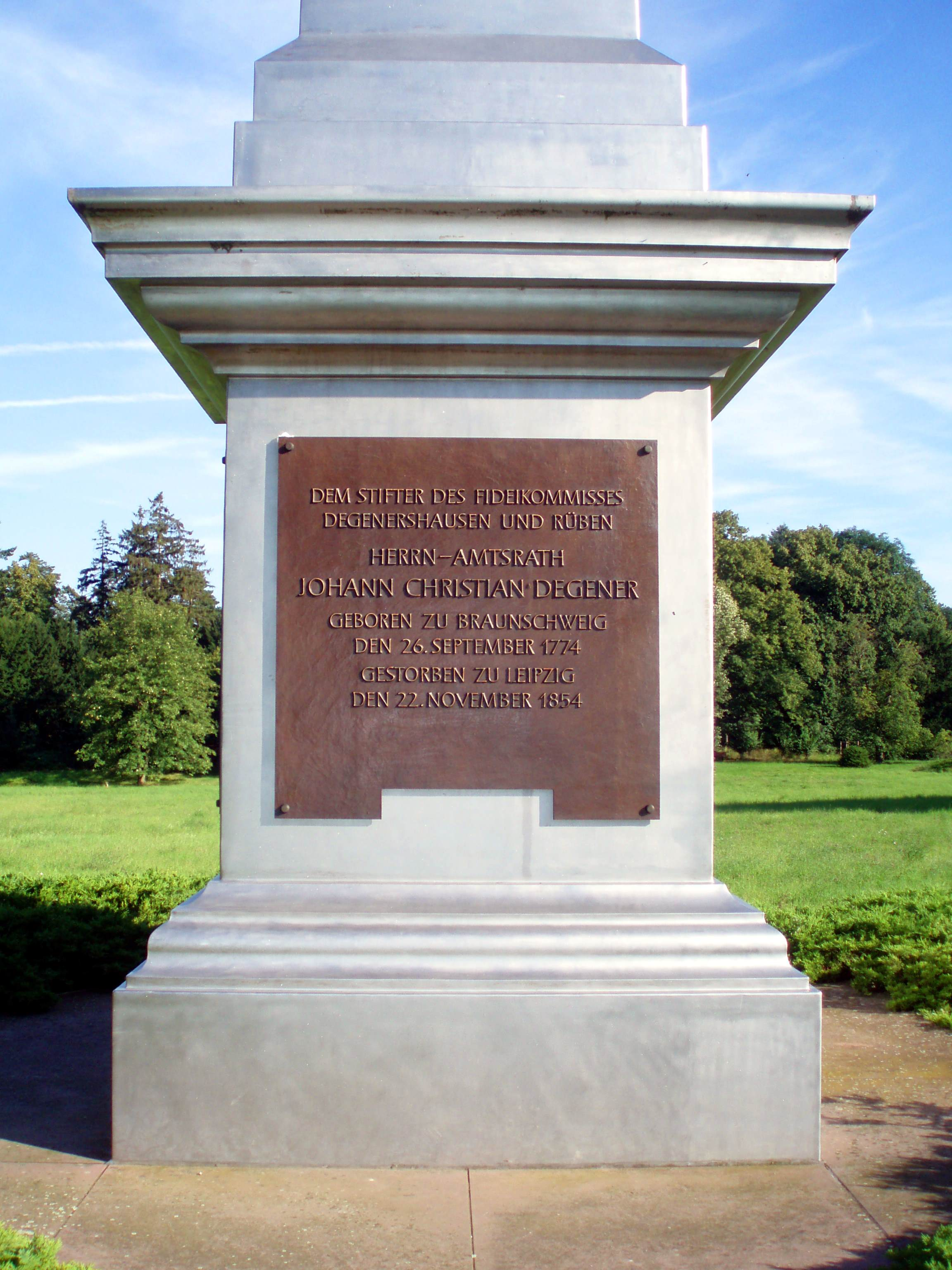 Degenersäule